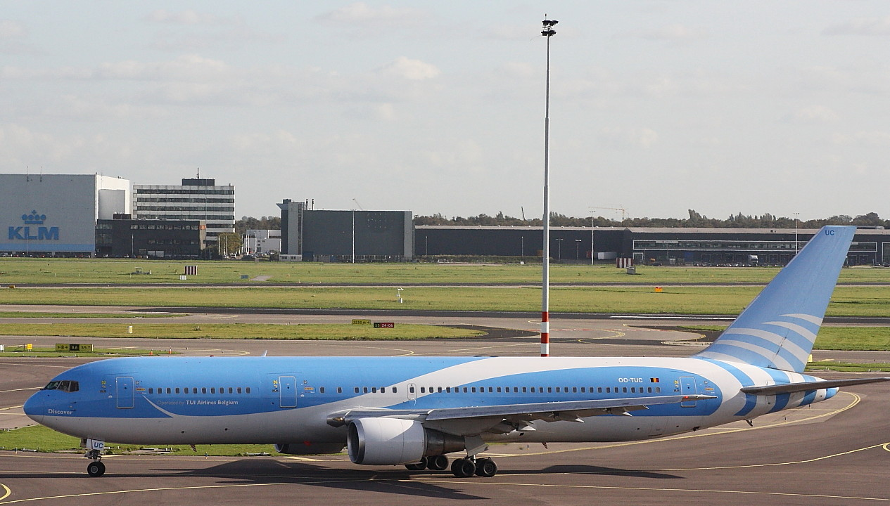 Boeing 767 JetairFly